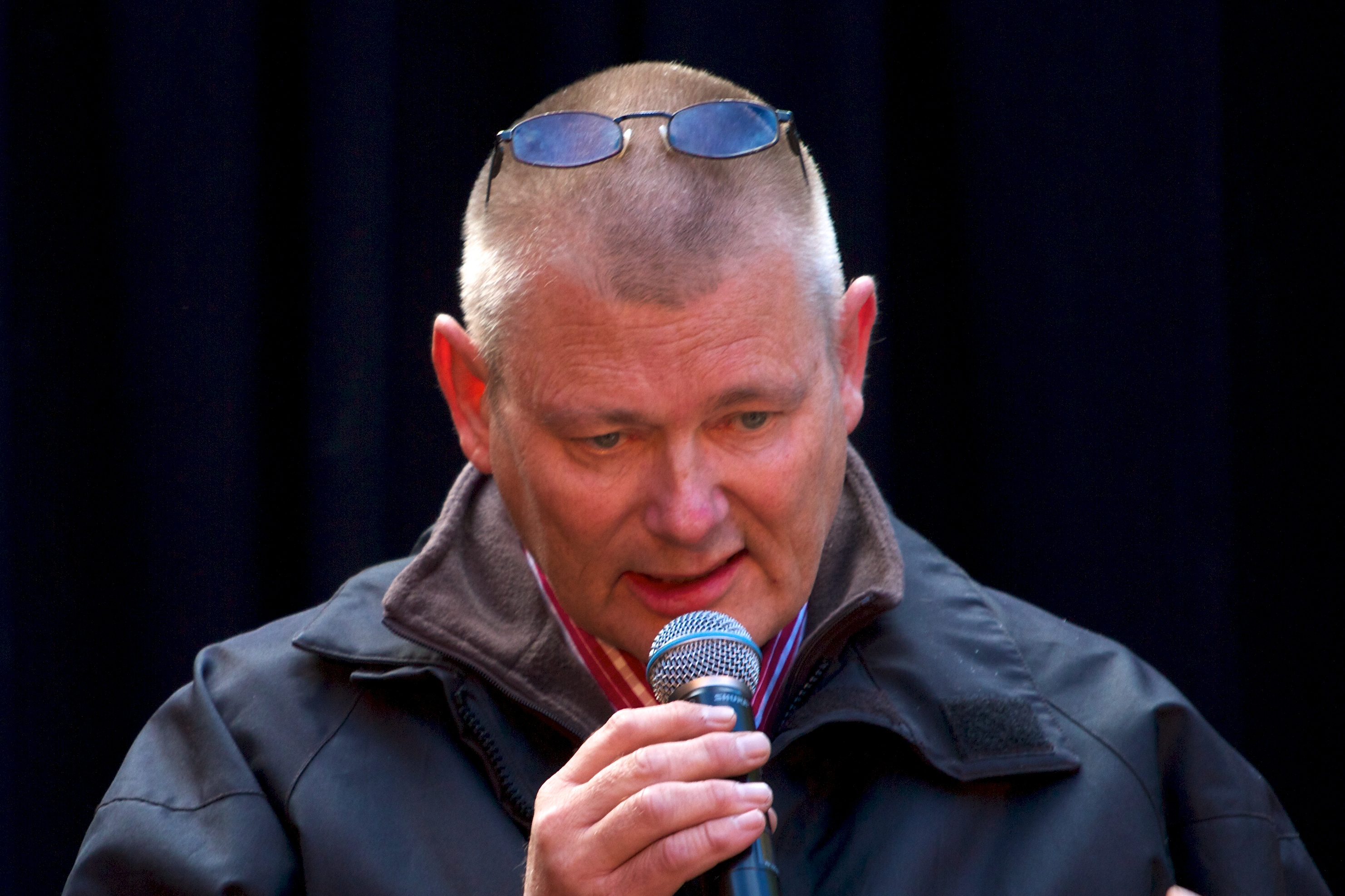 Thorvald Steen på Oslo bokfestival 2010.